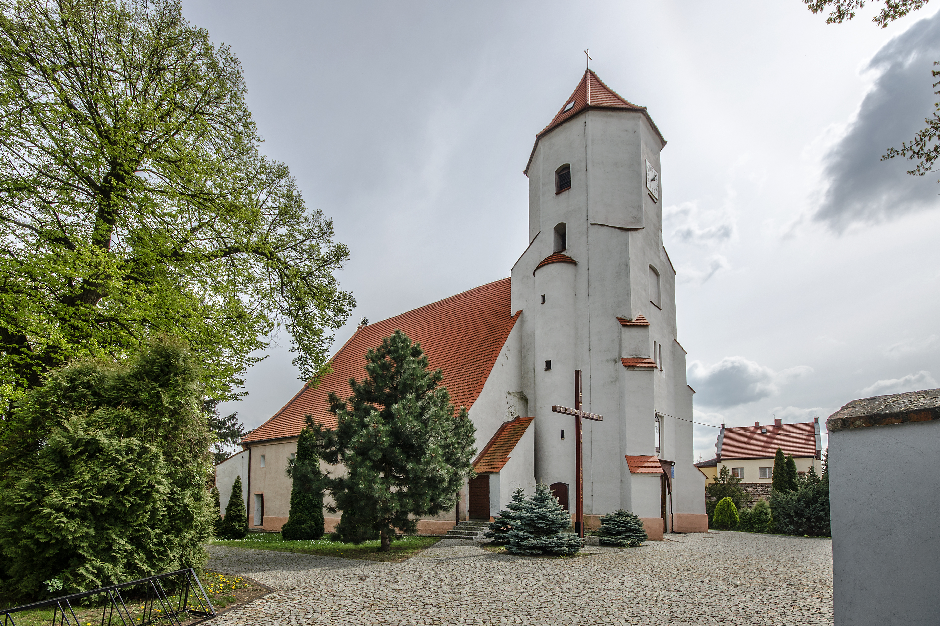 Chobienia, ul. Krzywa 8 - rzymskokatolicki kościół parafialny p.w. śś. Piotra i Pawła, XVI, XVIII